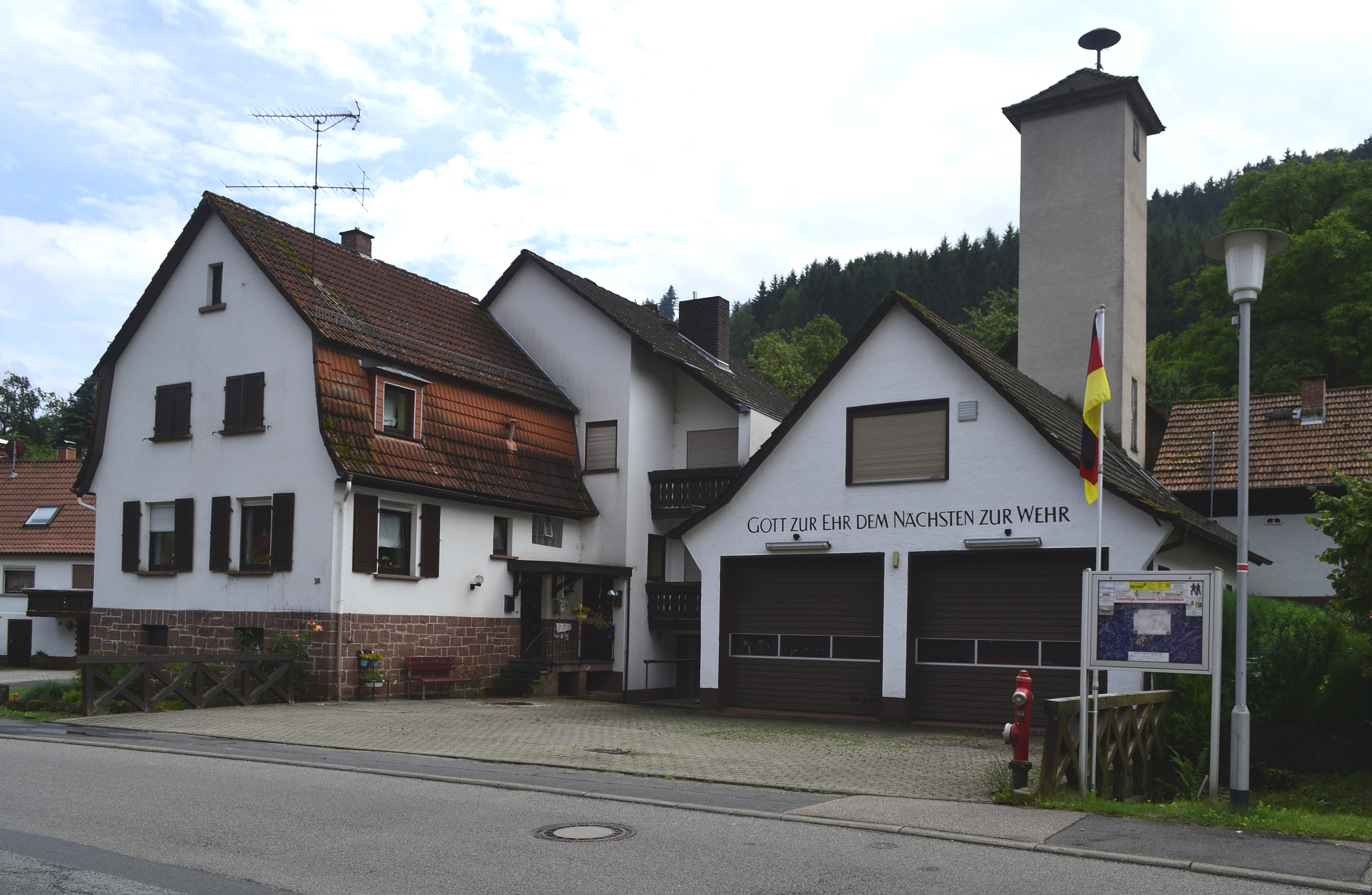 Obere Siegfriedstr. 30 und 32 (Freiwillige Feuerwehr) in Schöllenbach, Gemeinde Hesseneck